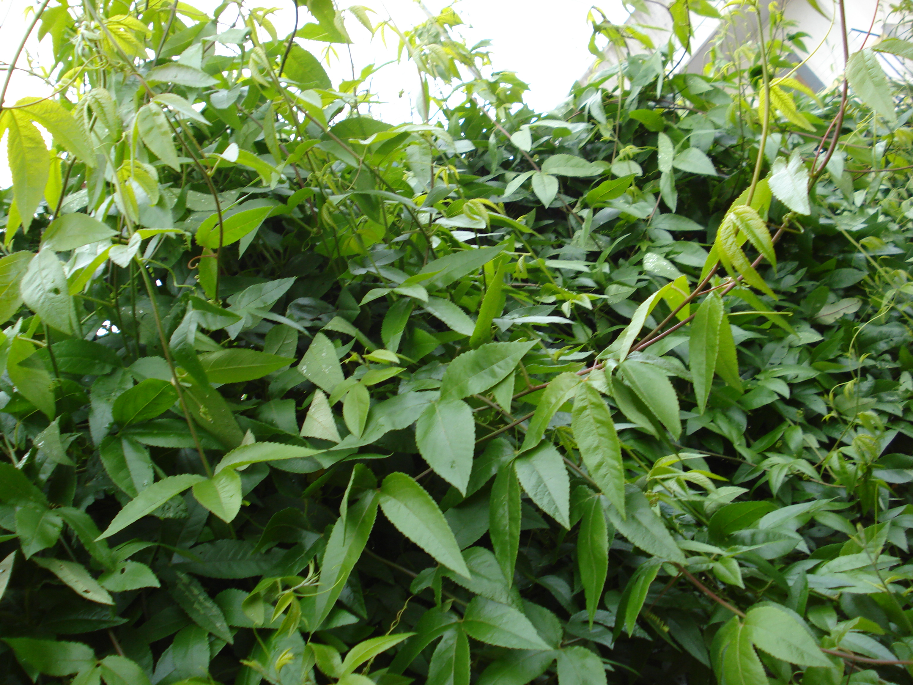 chioma della passiflora tarminiana